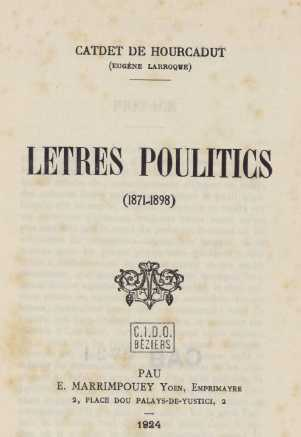 Livre de Hourcadut